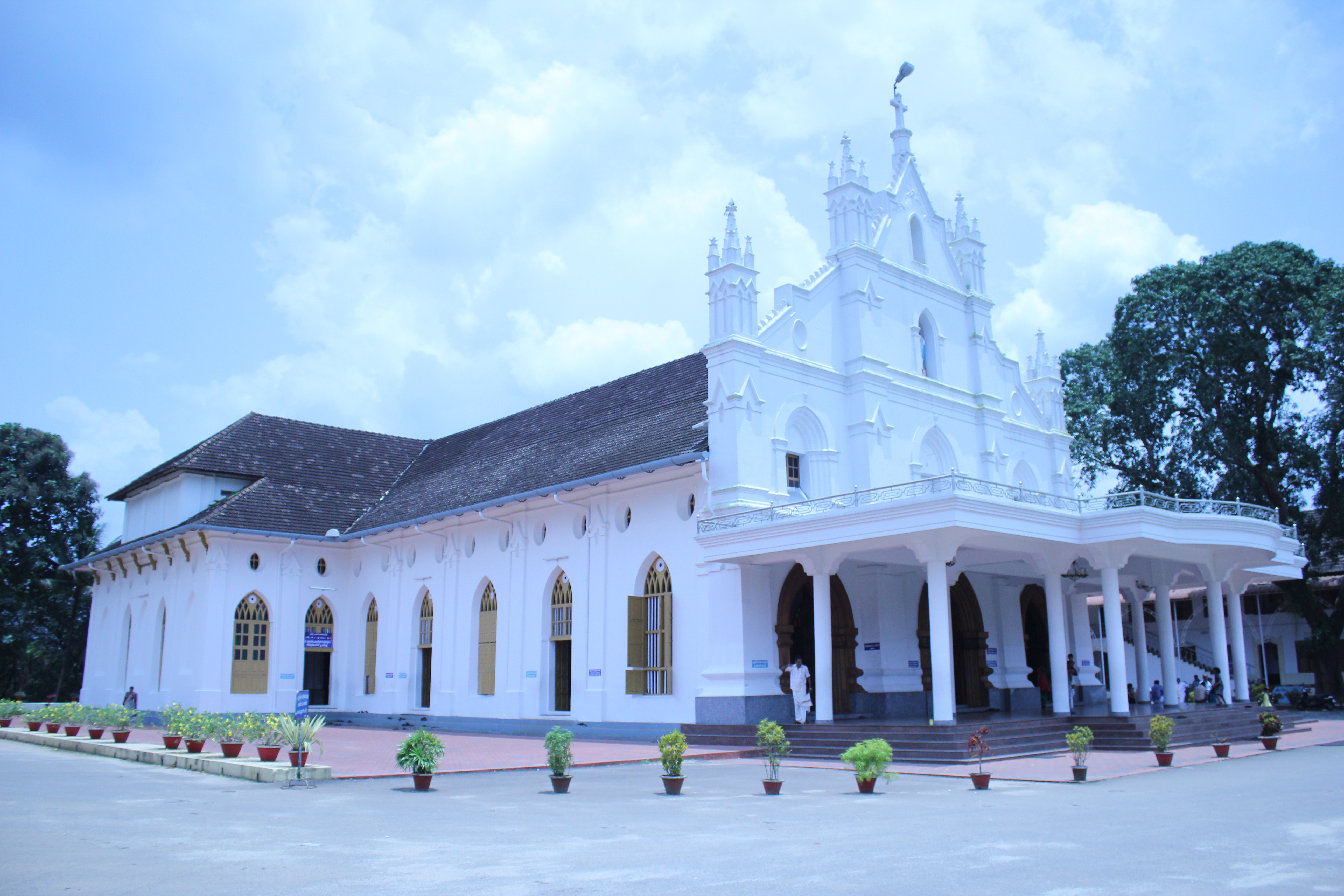 Bharananganam Church